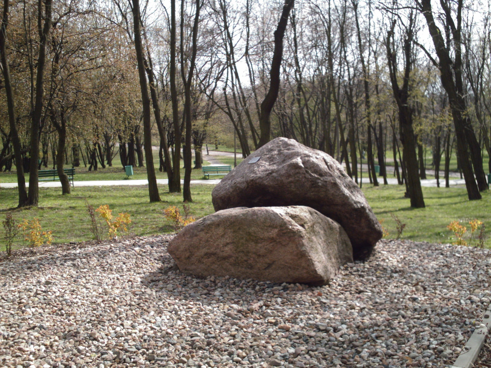 Pomnik dedykowany gen. Mariuszowi Zaruskiemu w parku Jego imienia w Łodzi na Stokach.